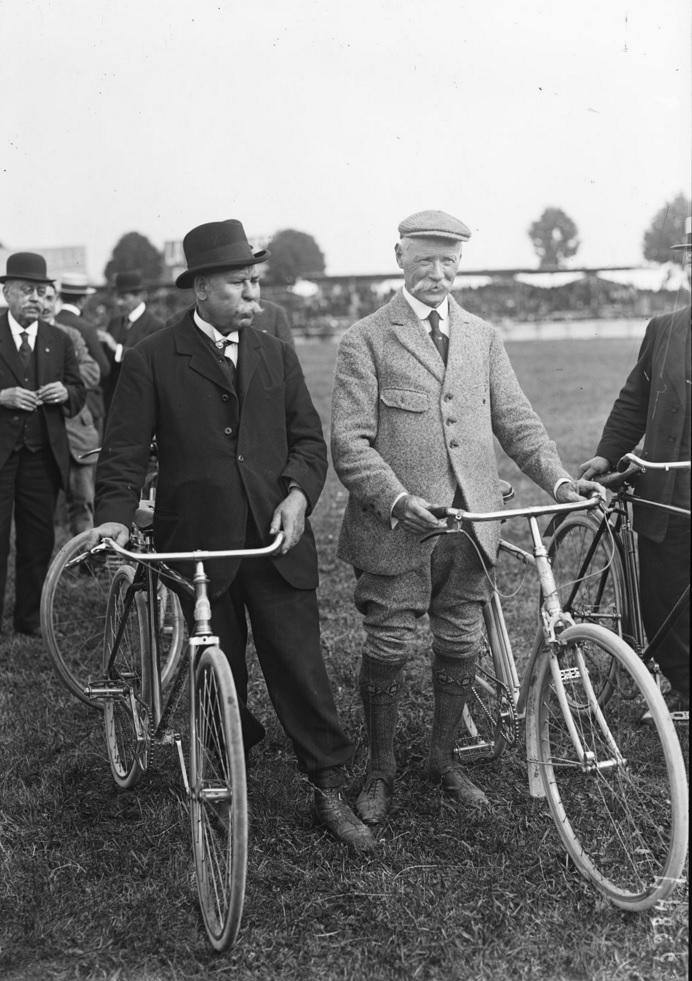 1920 Parc des Princes lors du jubilé du cycliste Thorvald Ellegaard, à gauche Charles Terront et à droite Jules Dubois